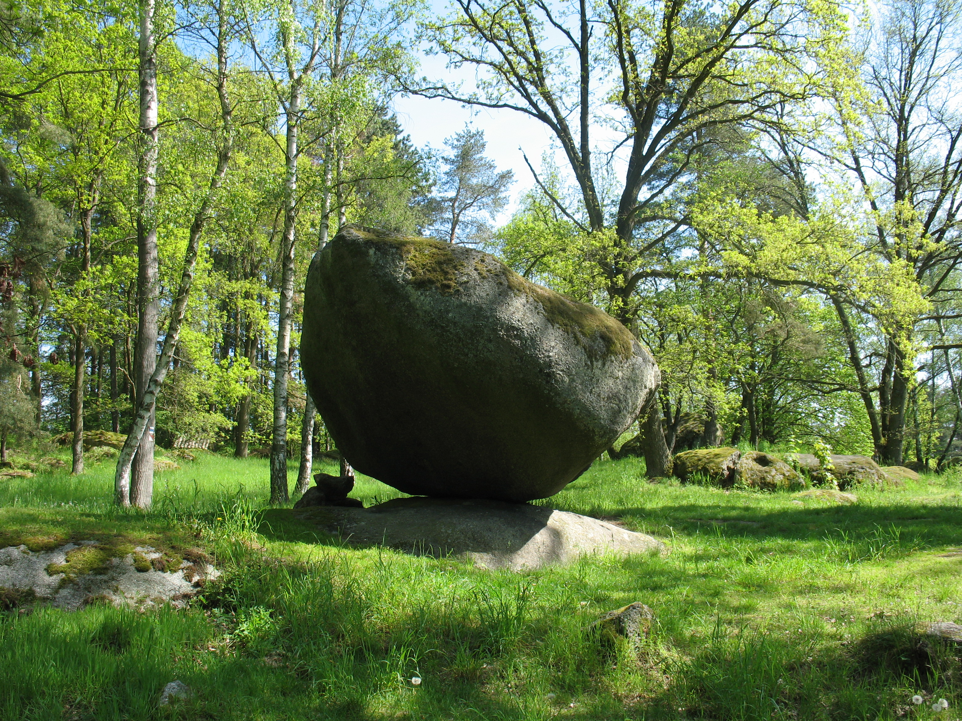 Přírodní památka Husova kazatelna, Viklan